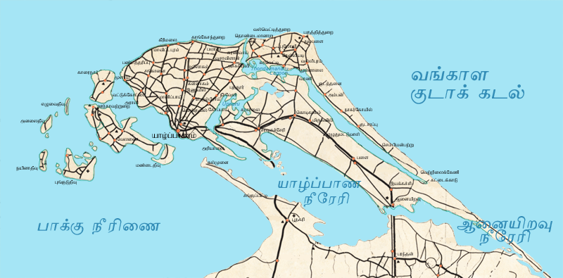 Jaffna District Map